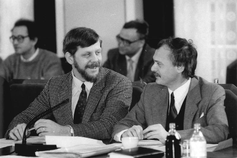 ADN-ZB Grimm 8.1.90-is Berlin: 6. Runder Tisch An den Beratungen im Konferenzzentrum Niederschönhausen nehmen erneut 16 Parteien, politische Gruppierungen und Organisationen teil. Martin Gutzeit (l) und Ibrahim Böhme (r) vertreten die SDP.